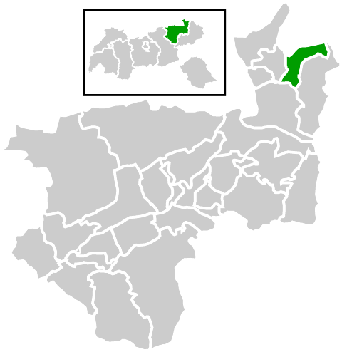 Lage der Gemeinde innerhalb des Bezirks Kufstein